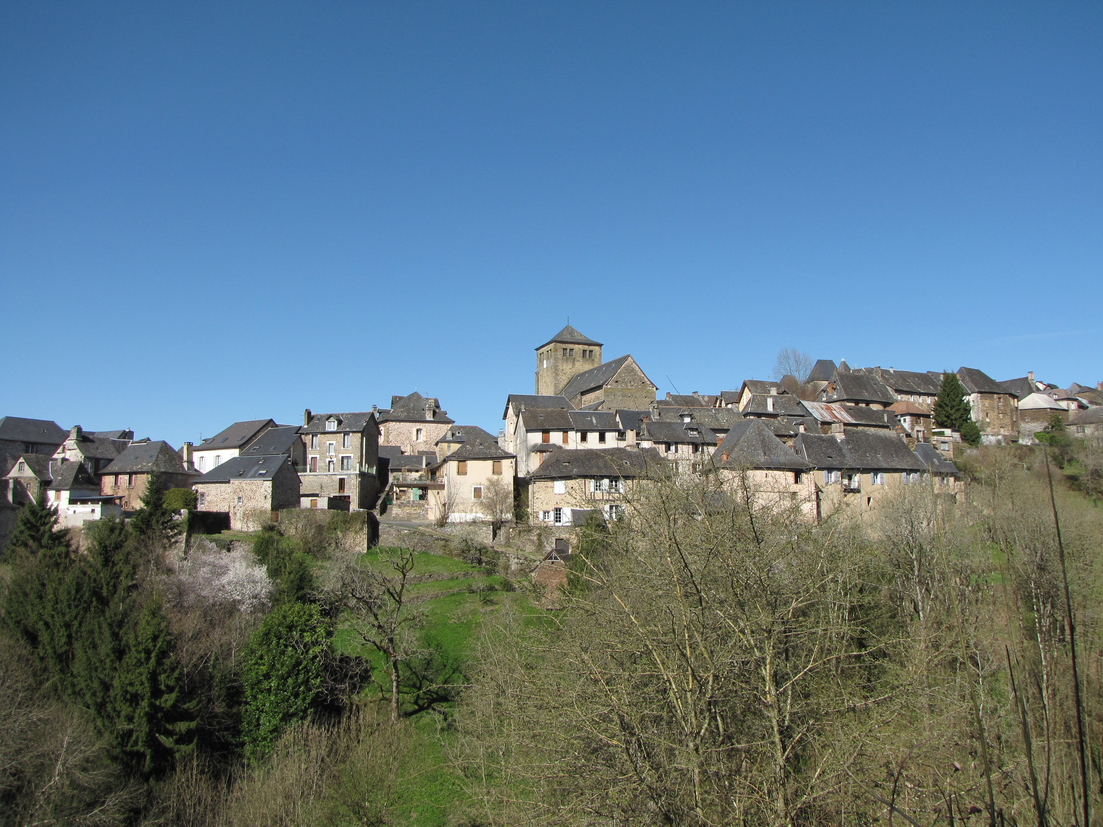 Vue du village de Voutezac